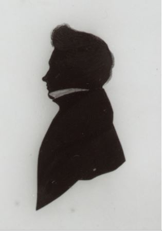 Portret van Johannes Wilhelmus van Romunde (1812-1860), silhouet, 12,7 x 8,3 cm Identificatie gebaseerd op achterschrift Opmerking portret VOOROVER GEKAMD HAAR MET KUIF; "VADERMOORDERS".